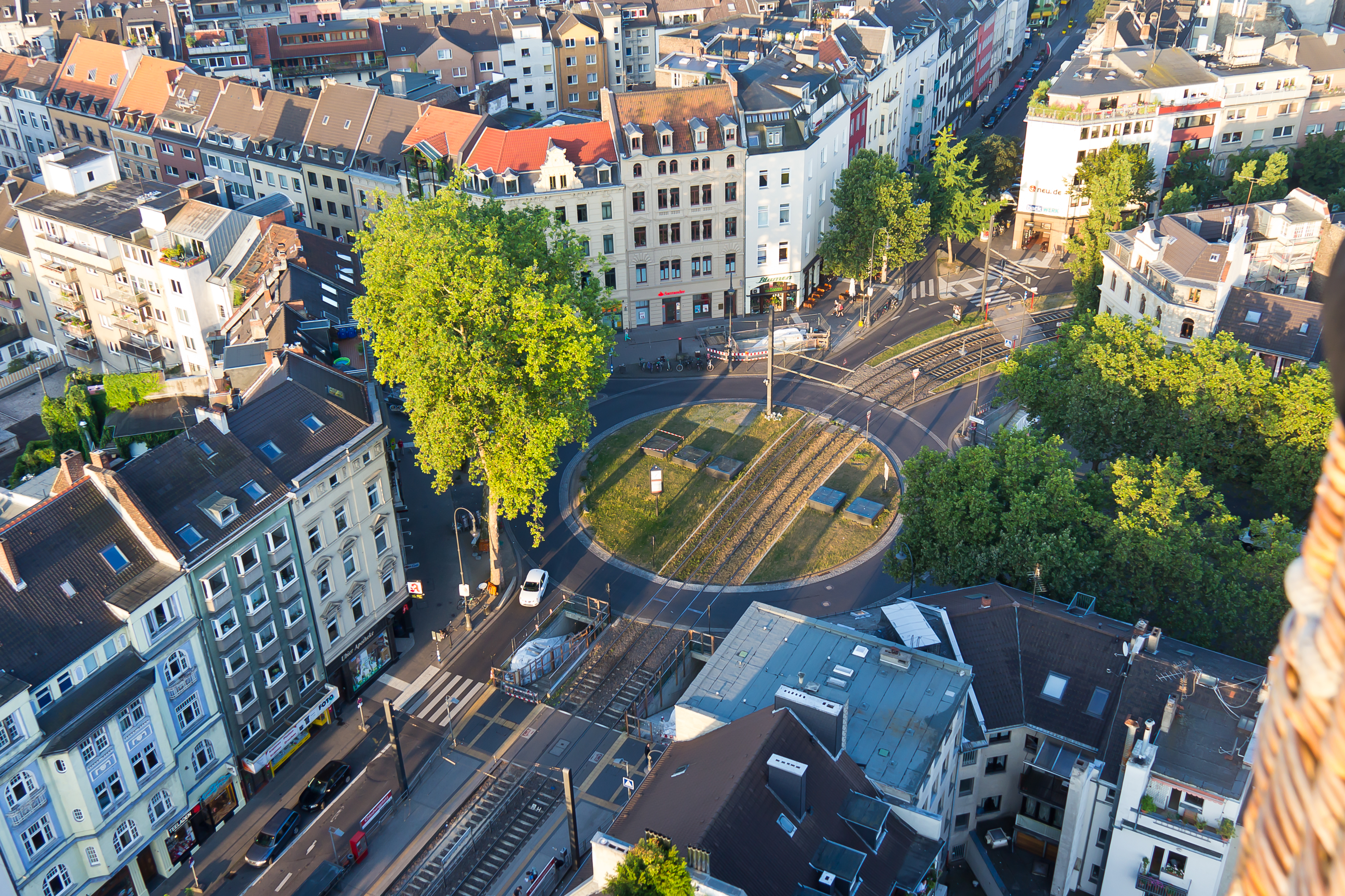 Ballonfahrt über Köln - Chlodwigplatz